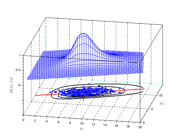 Aizermannsche Potentialfunktion: Anwendung einer 2d-Klassenbeschreibung. Die Klasse ist im Merkmalsraum zu den Hauptachsen gedreht.